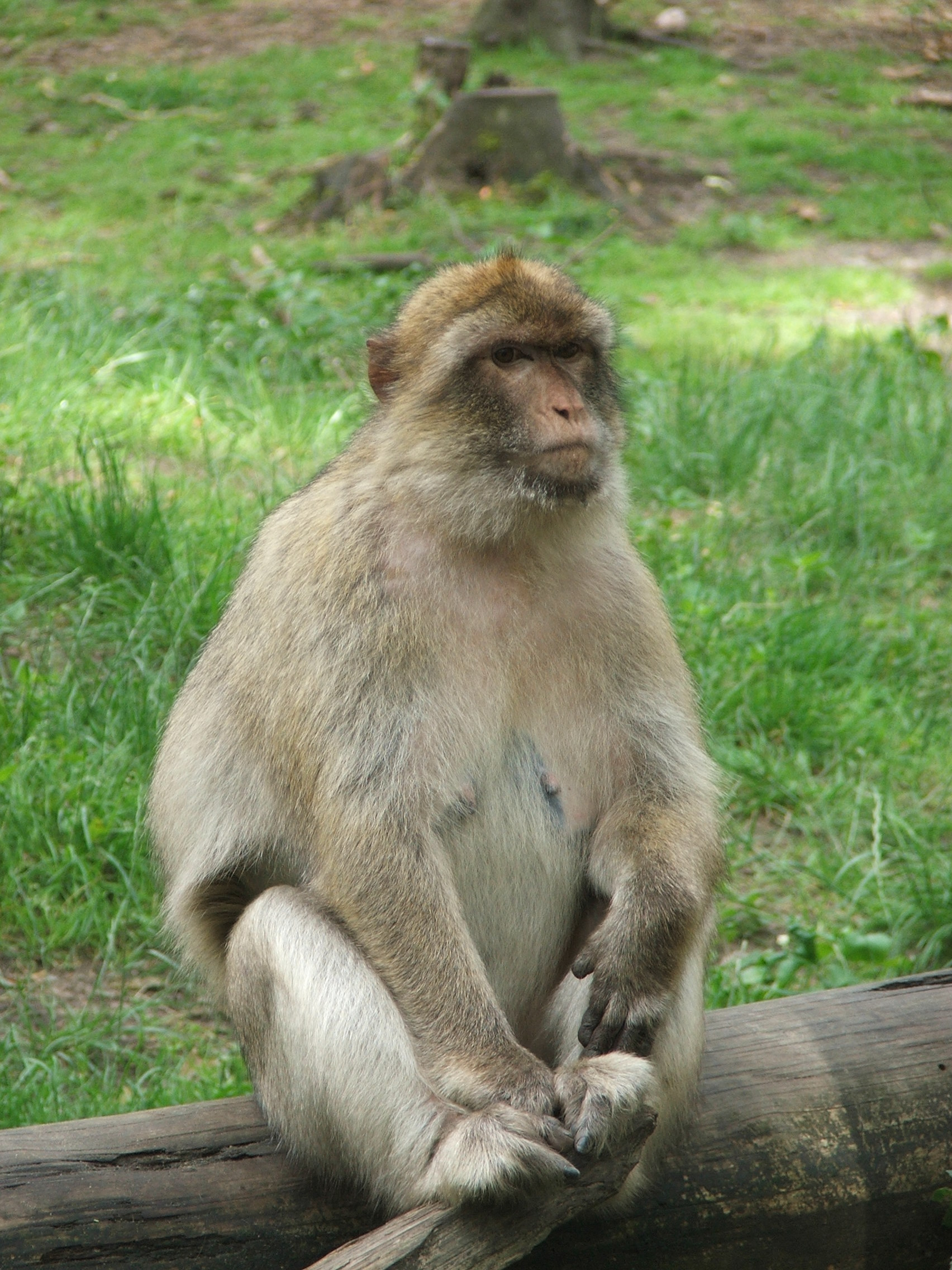 Macaca sylvanus (ZOO in Ueckermünde)